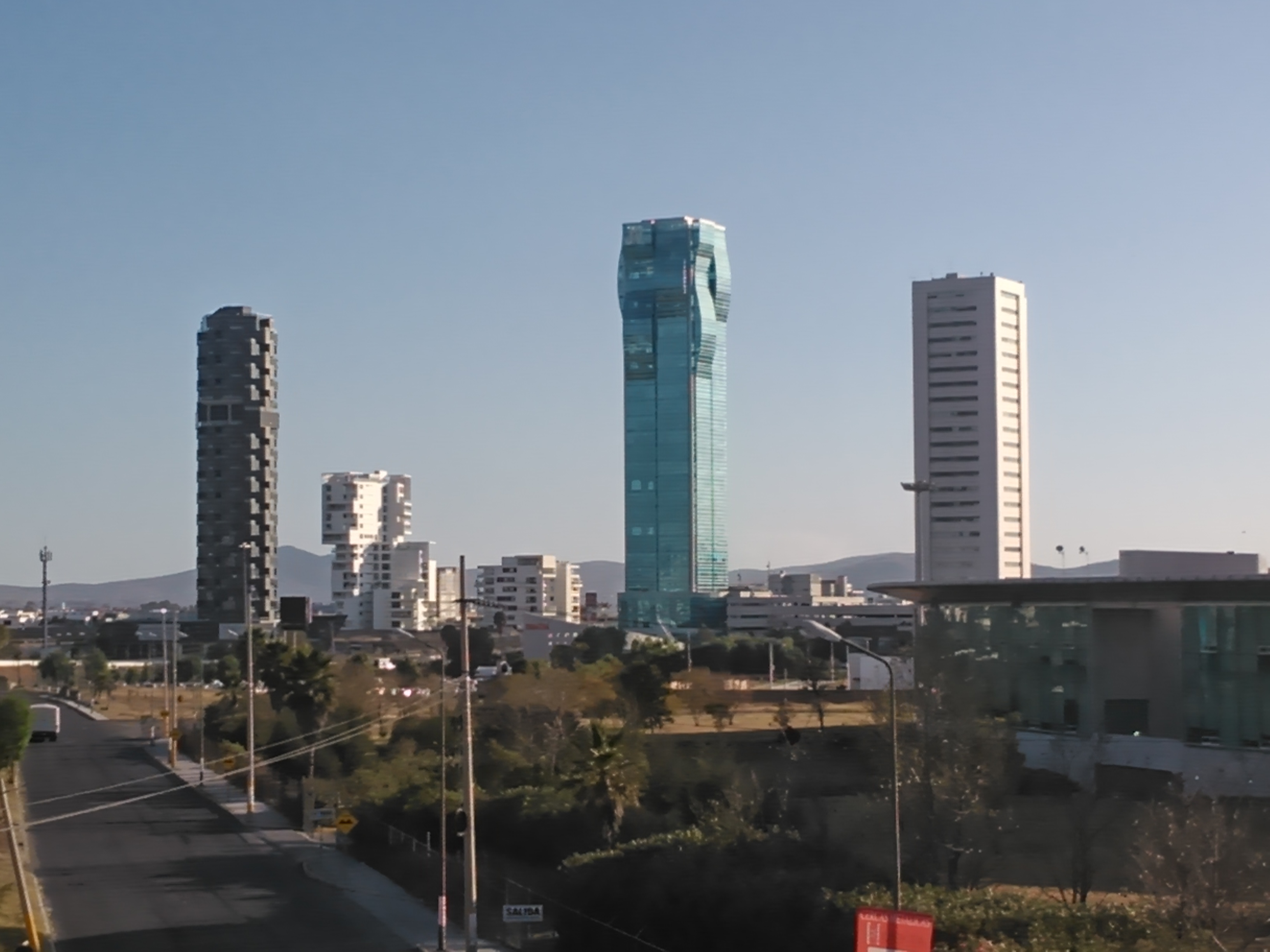 Edificios en San Andrés Cholula, Zona Metropolitana de Puebla.